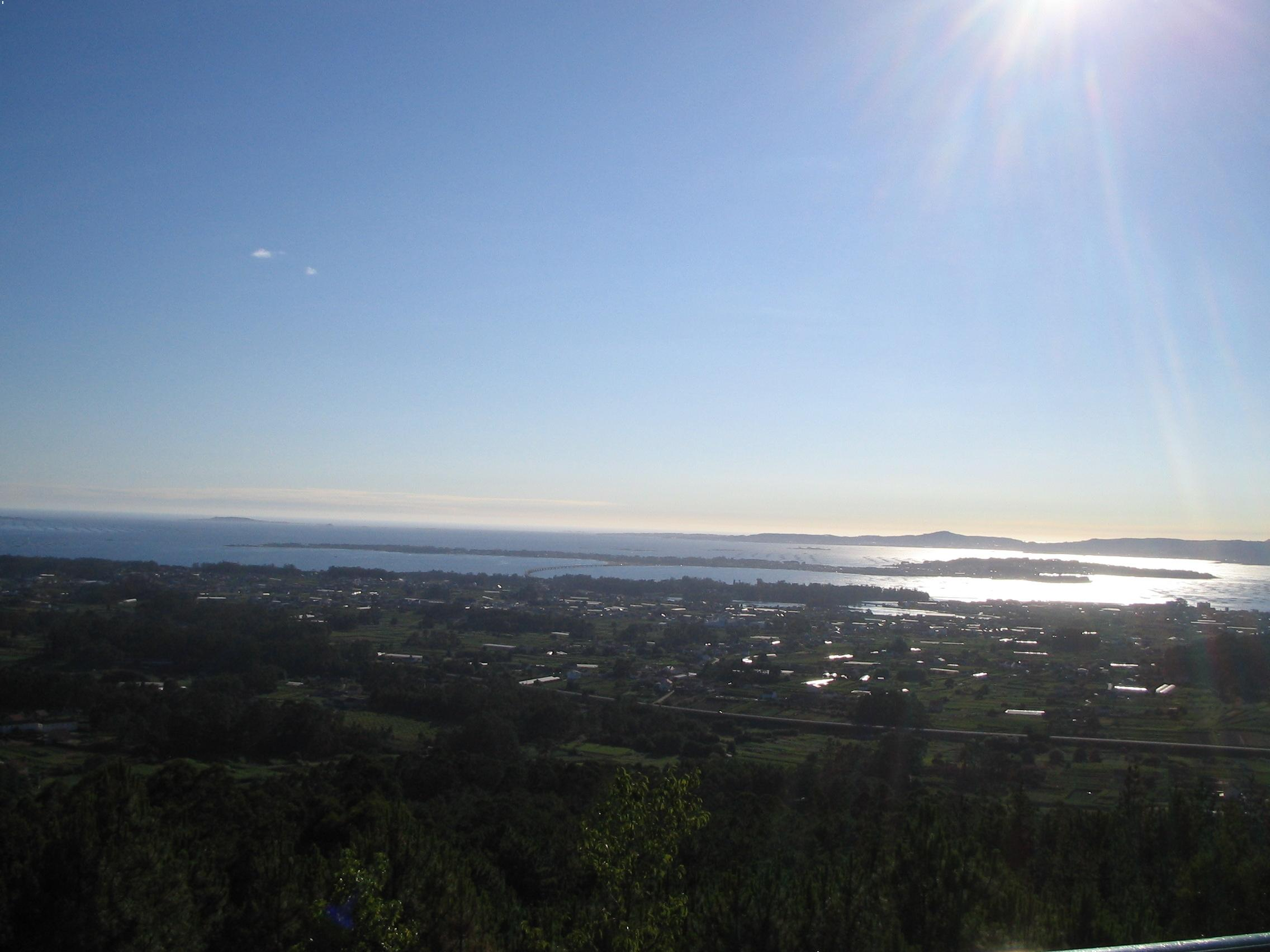 Ría de Arousa en Galicia (España)